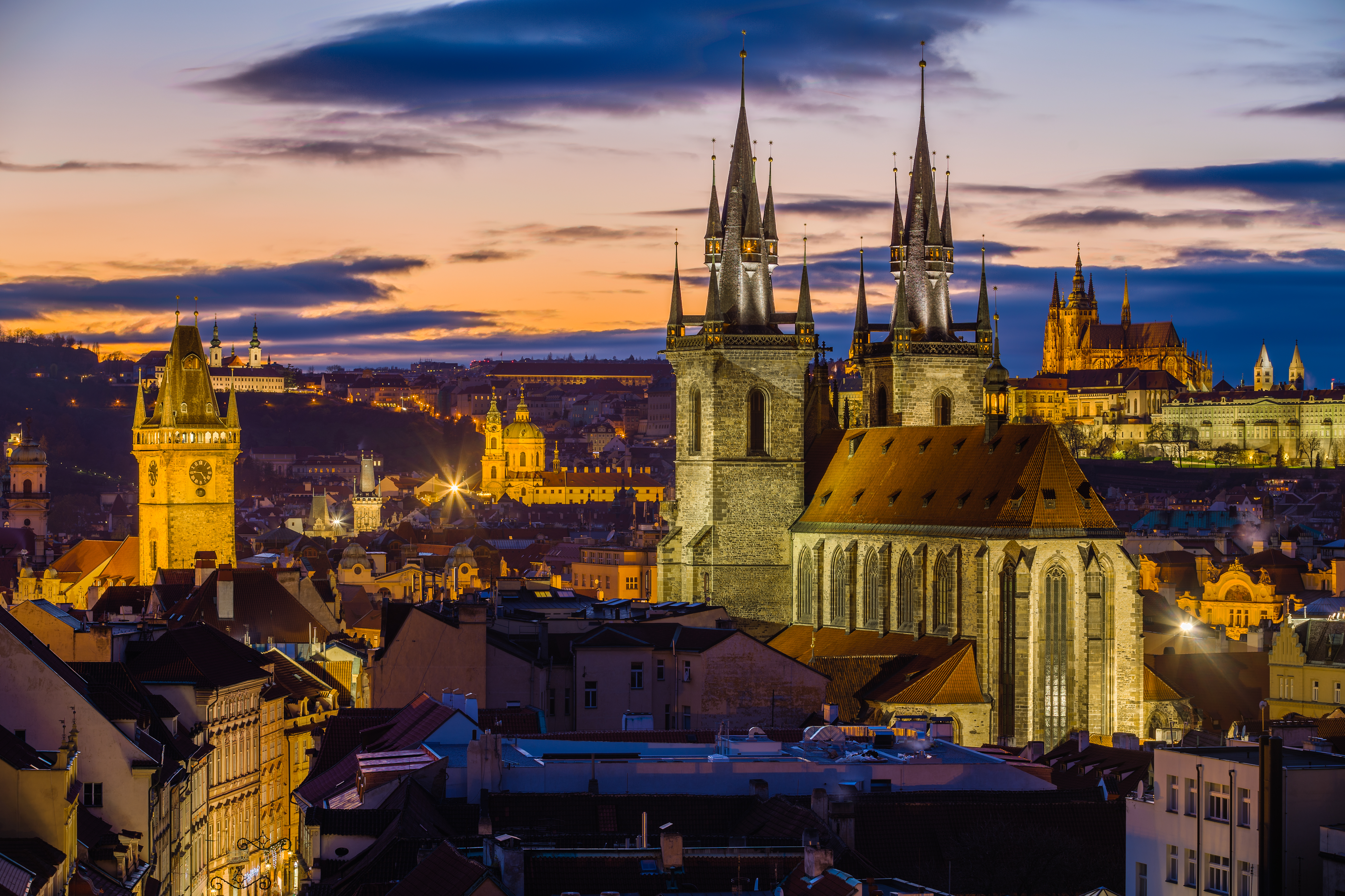 Panorama Pragi English | polski | +/−